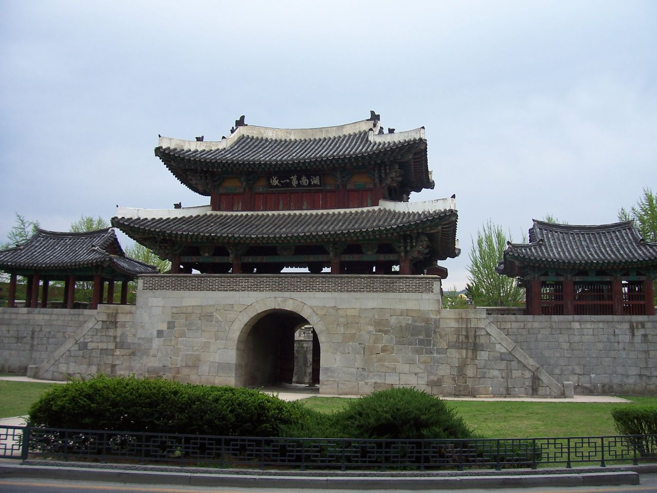 Pungnammun